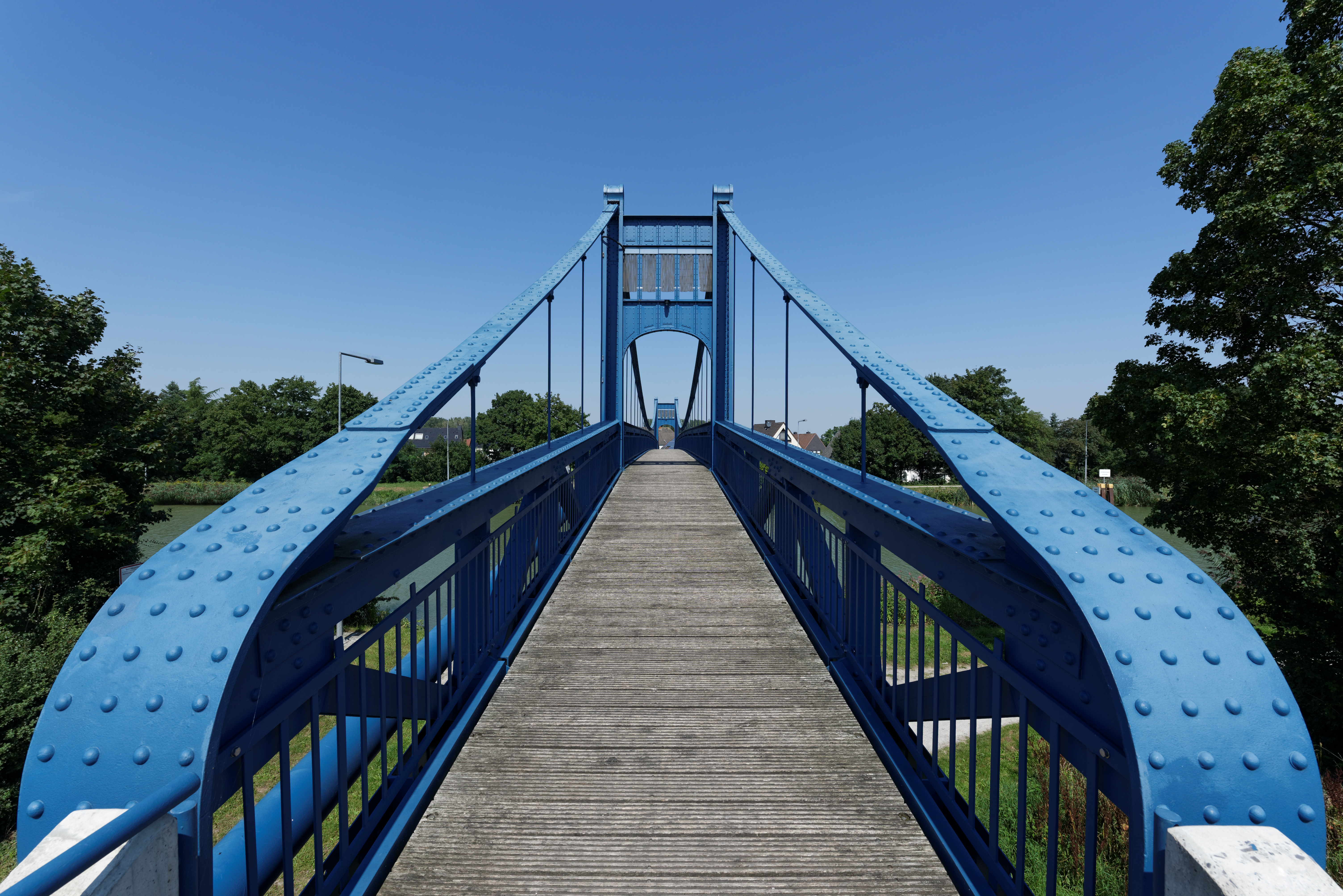 Fußgängerhängebrücke Schulweg-Steg im Stadtbezirk Hamm-Uentrop der kreisfreien Stadt Hamm in Nordrhein-Westfalen This is a photograph of an architectural monument.